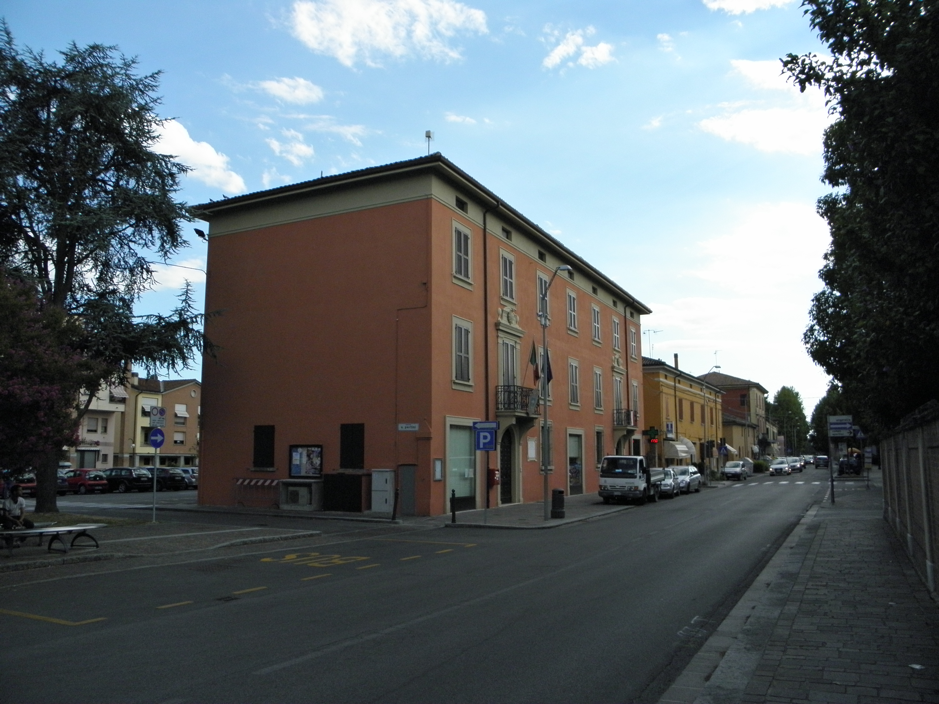 Baricella: Palazzo Municipale.